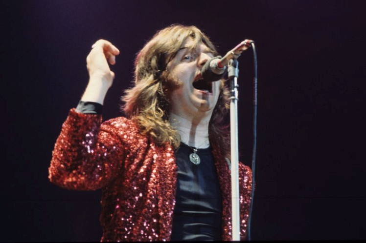 Taken in New Haven, CT.